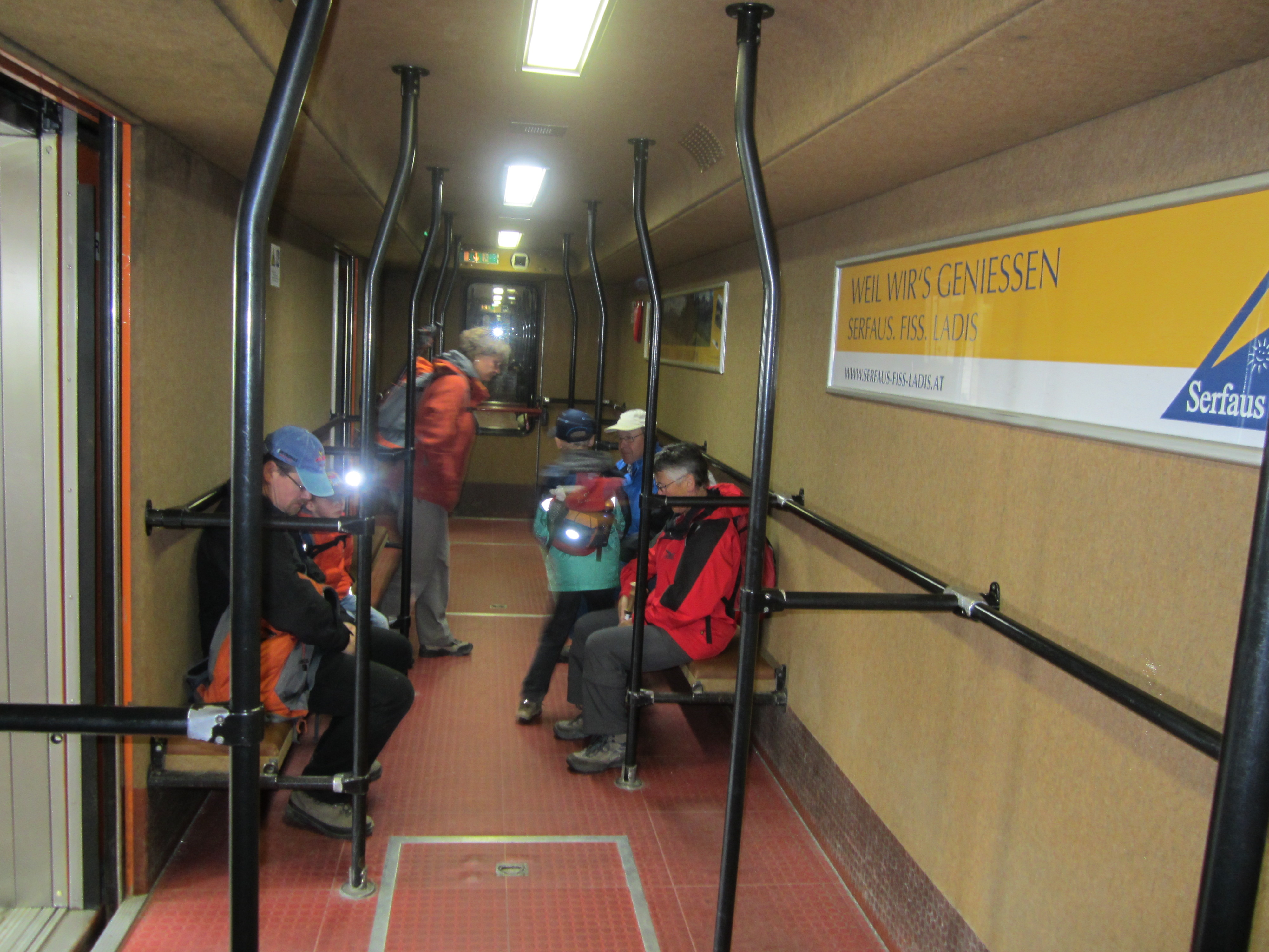 Fahrgastraum der Dorfbahn Serfaus